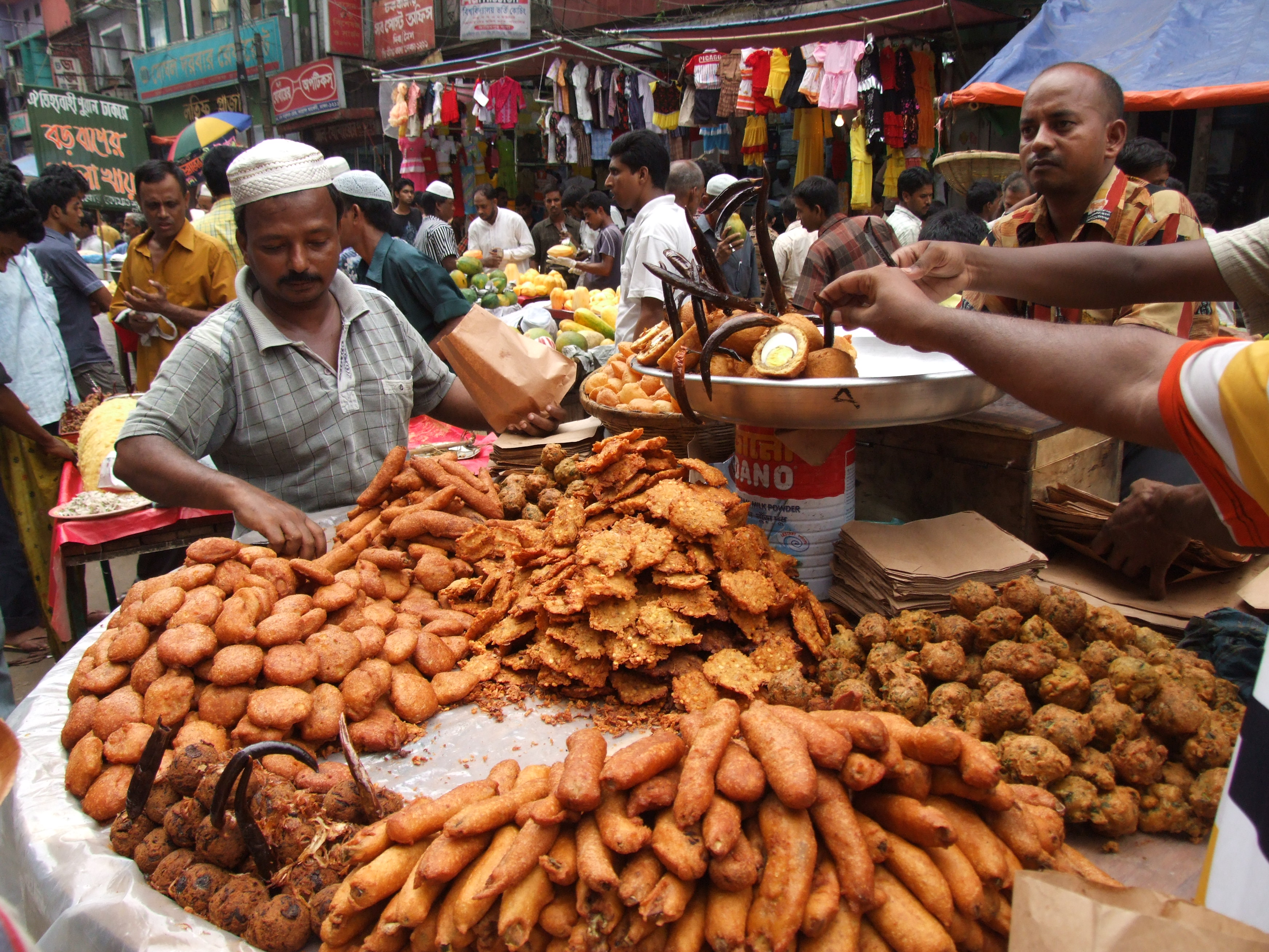 Iftar items available @ puran Dhaka